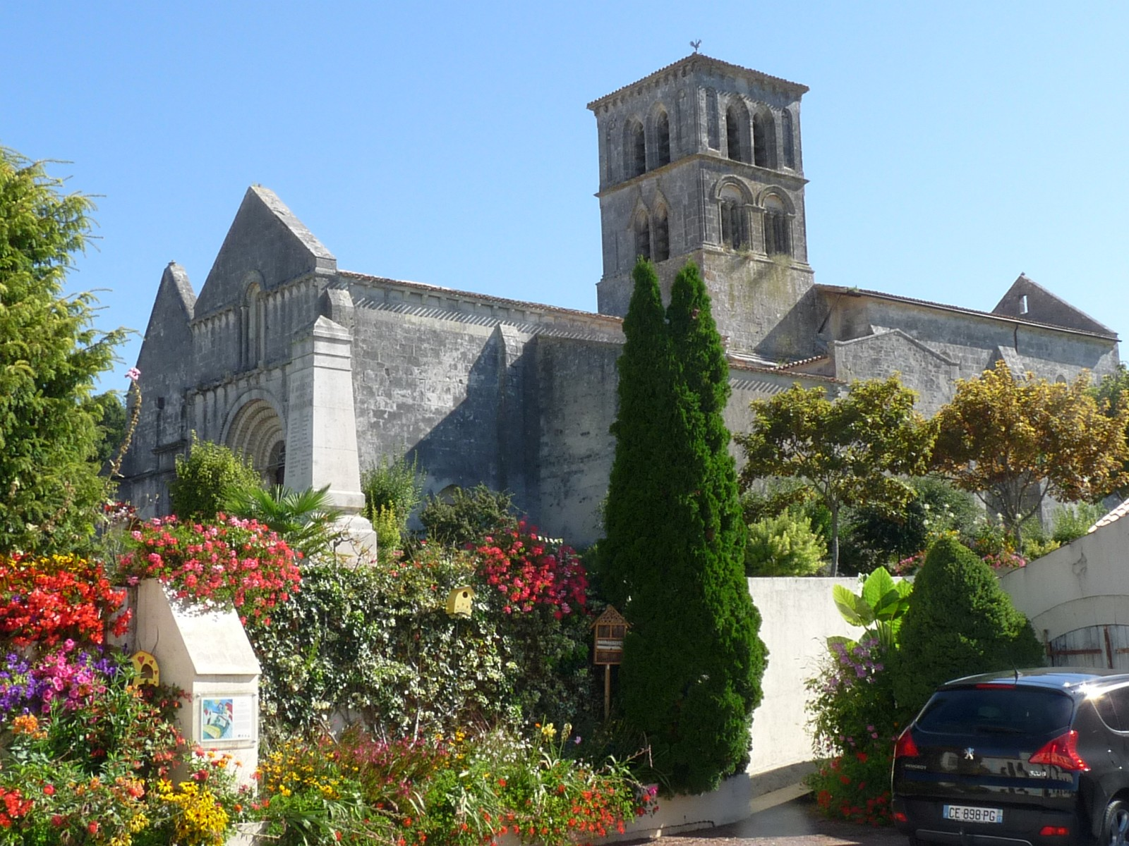 Eglise d'Arthenac, Charente-Maritime, France